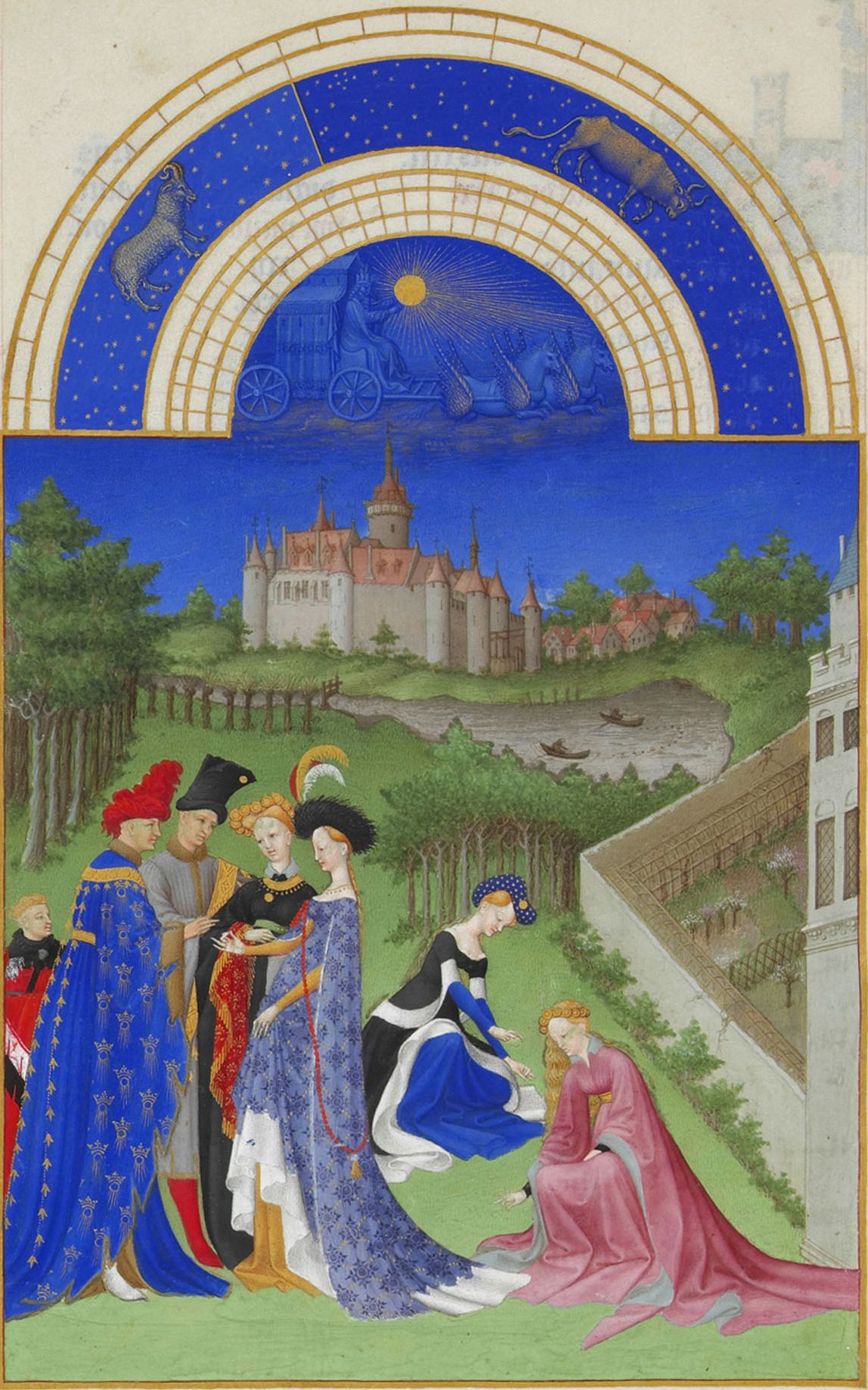 Le sujet principal de cette peinture est une scène de fiançailles : au premier plan, à gauche, un couple échange des anneaux devant deux témoins et un autre personnage, représenté derrière, plus petit que les autres. Plus au centre, deux suivantes cueillent des fleurs. À droite, on aperçoit un verger clos de murs et d’un édifice à créneaux. À l'arrière-plan se dresse un château, souvent désigné comme le château de Dourdan. Il pourrait aussi s'agir du château de Pierrefonds.